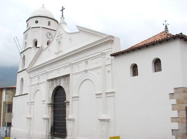 Parroquia Catedral Nuestra Señora de la Paz-Trujillo